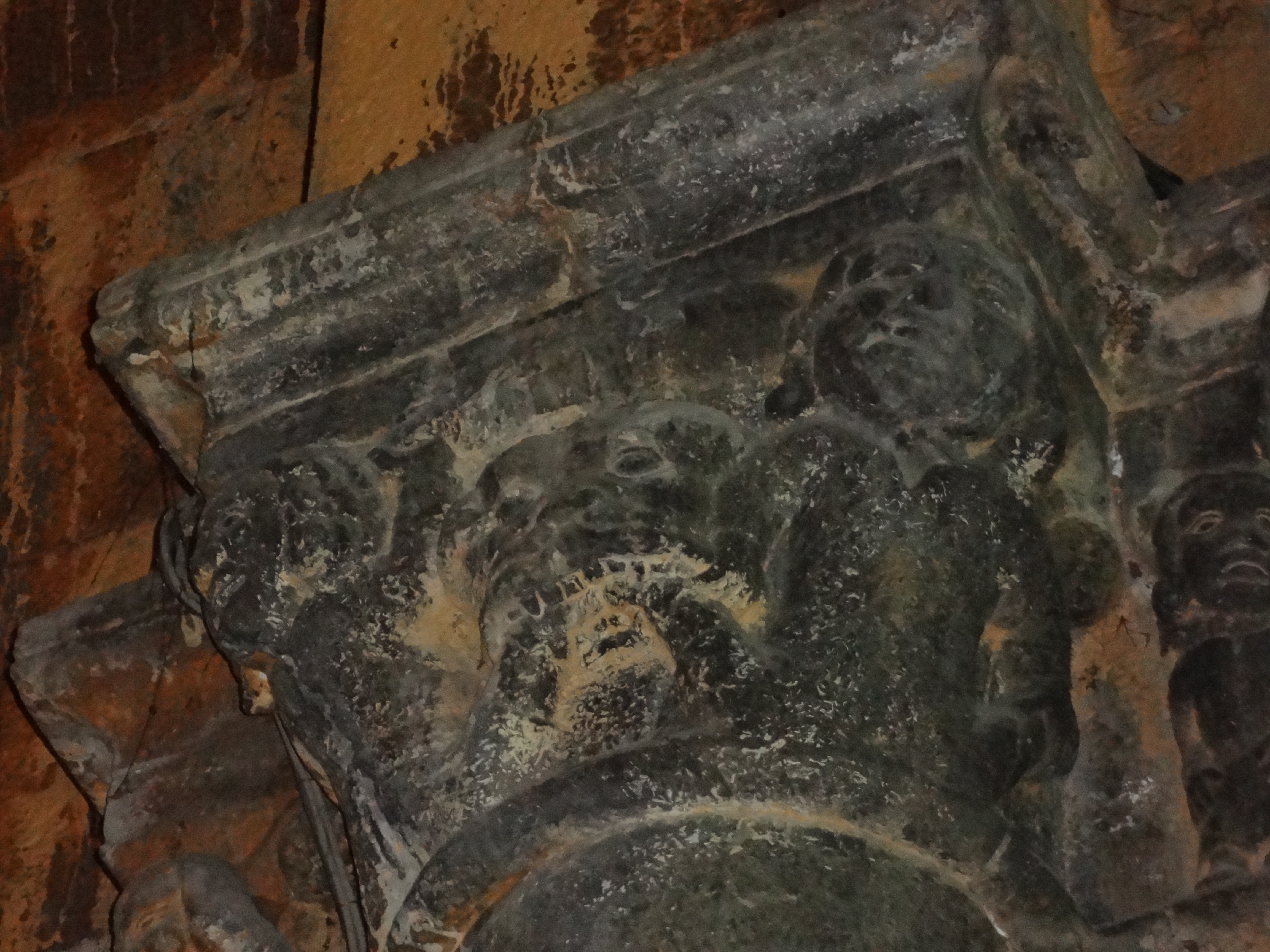 église Notre-Dame-de-Nazareth de Seyne, Alpes-de-Haute-Provence